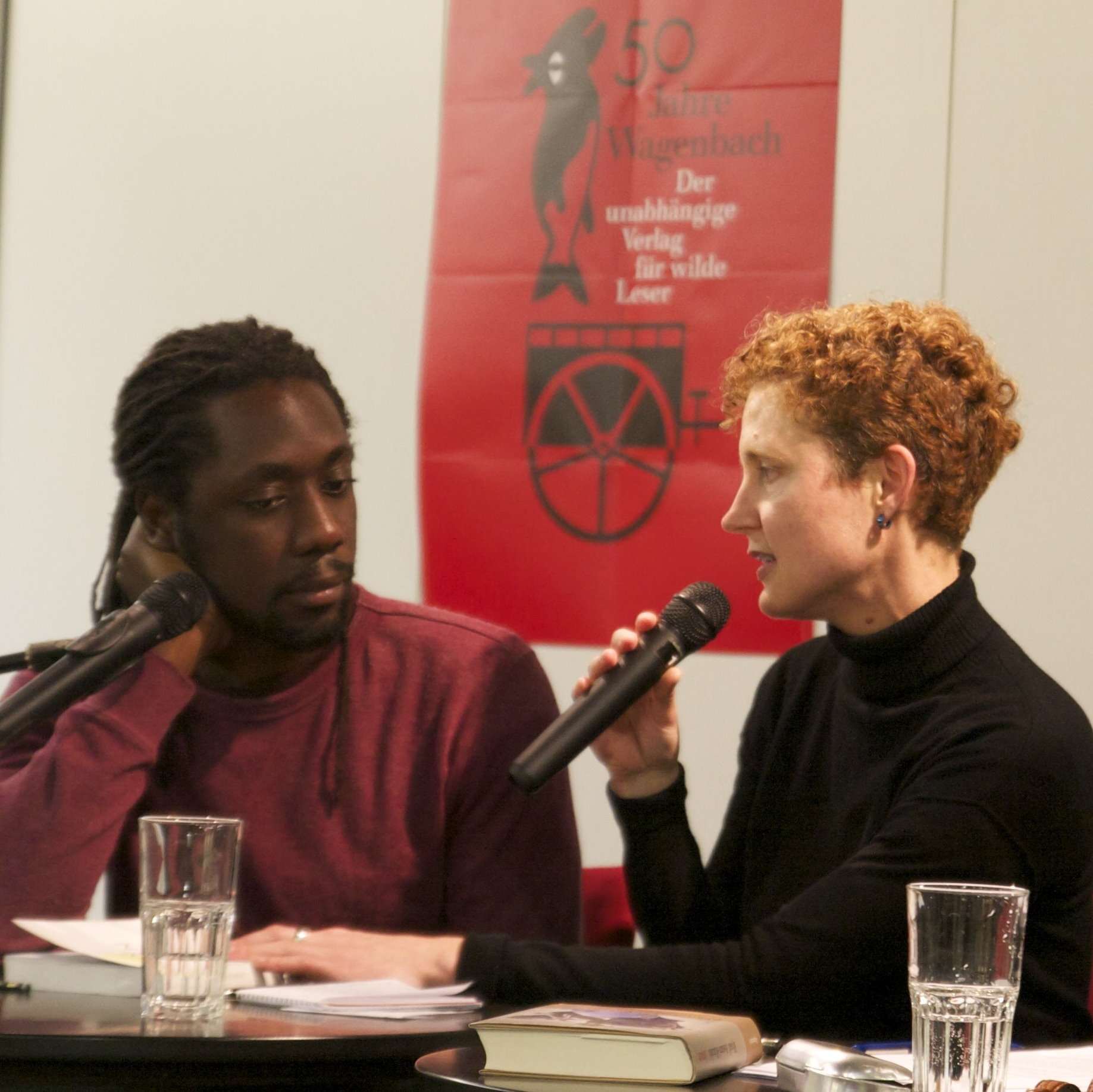 Ryad Assani-Razaki und seine Übersetzerin Sonja Finck, Autorenlesung aus "Iman", Moderation: David Eisermann, Heine Haus Düsseldorf, 19. März 2014